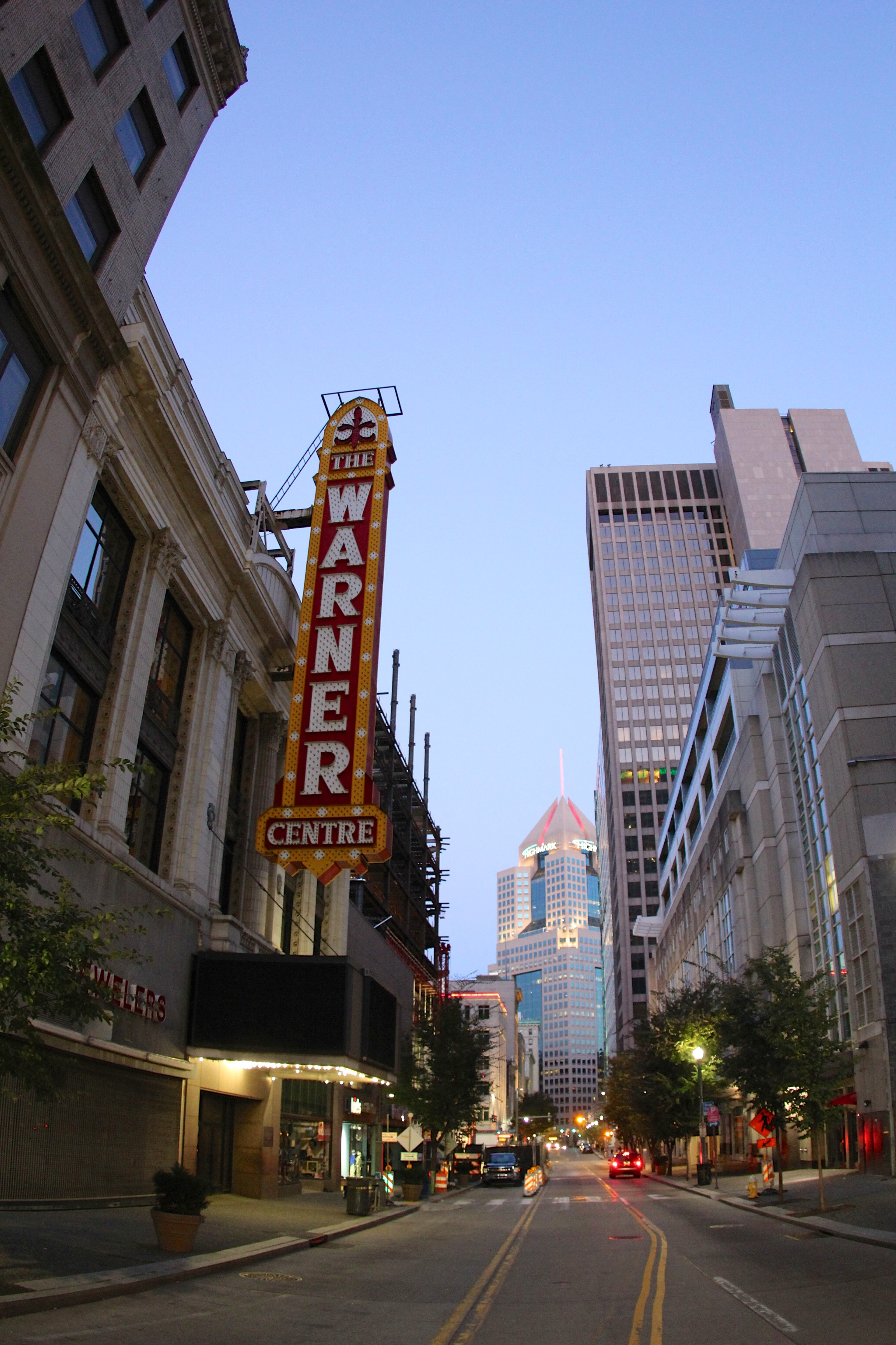 @ Pittsburgh, PA